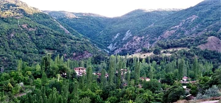 güllüce köyü